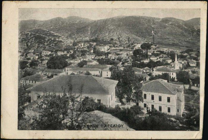 Картичка от Правища.